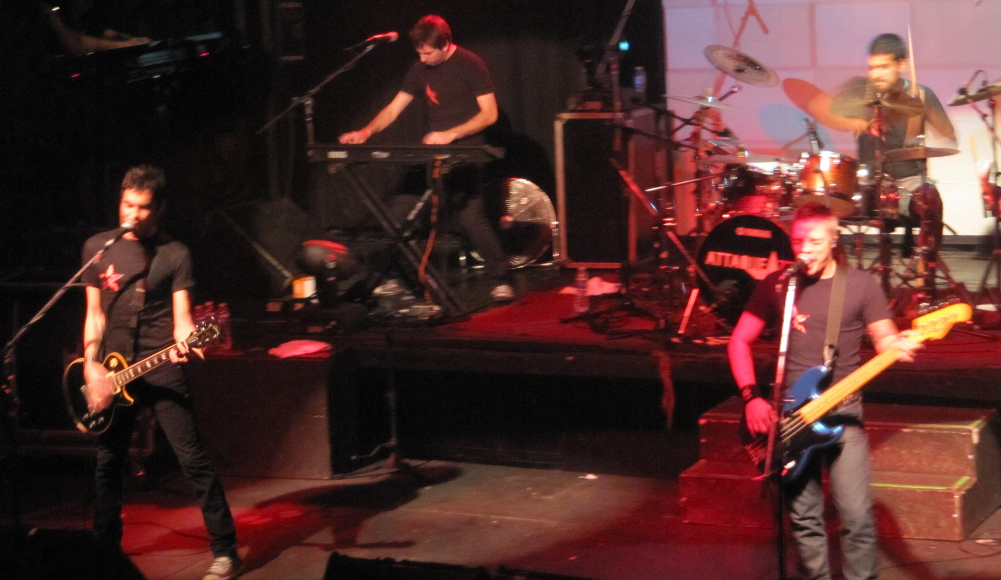 Attaque 77 dando un show en Buenos Aires.